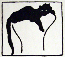 Logo des Paul Cassirer Verlags: Panther auf einem Baumstrunk